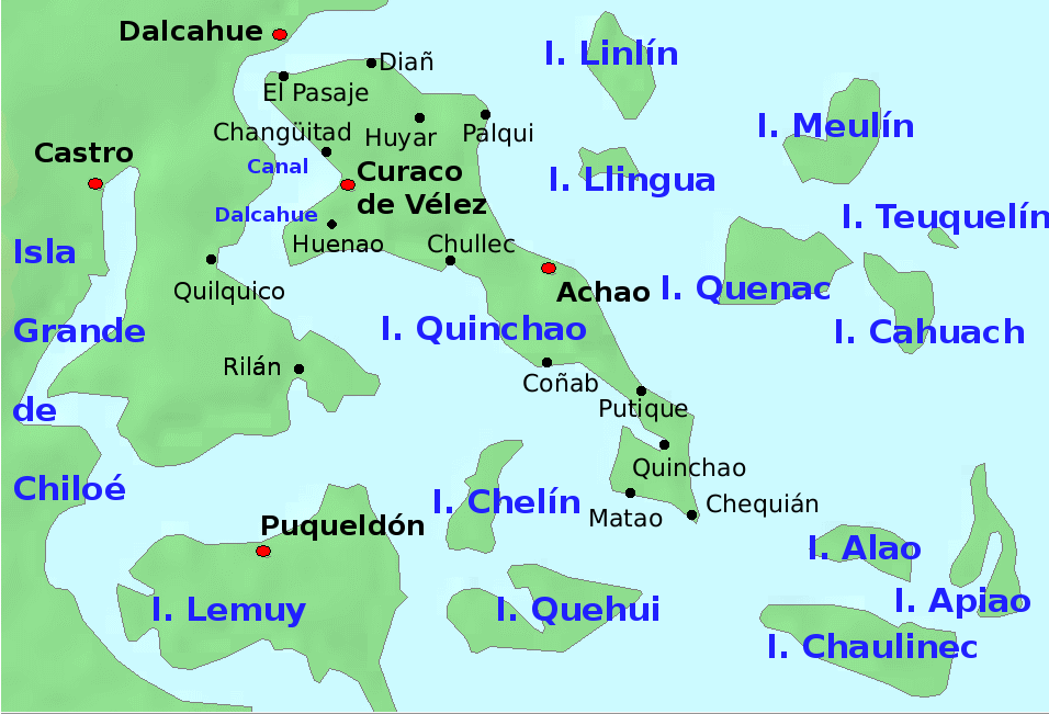 Mapa de la Isla Quinchao y sus alrededores en el Archipiélago de Chiloé, Chile.